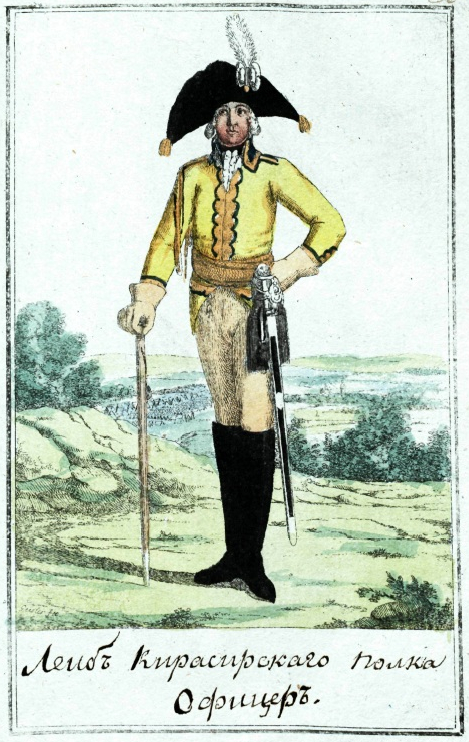 Офицер лейб-кирасирского полка.